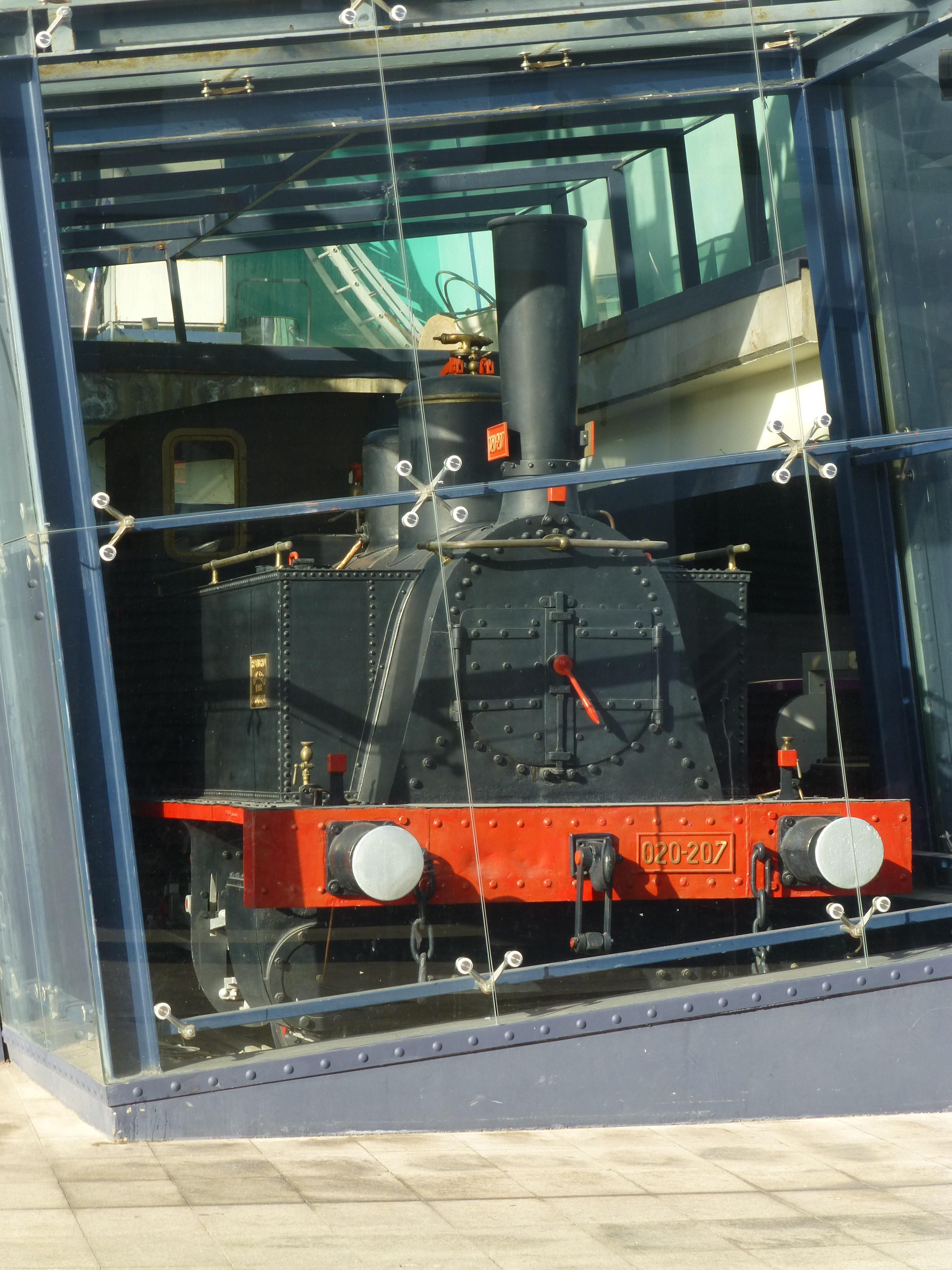 Locomotora de vapor, de ancho ibérico o Renfe (1674 mm), fabricada en Bélgica en el año 1885 por Couillet, con el número de construccción 790. Matrícula de Renfe número 020-0235. Era una locomotora para maniobras. Finalizó su servicio a comienzos de los años 70, del siglo XX, y fue destinada a un pedestal en un colegio de Madrid. Posteriormente fue adquirida por el Museo Elder de la Ciencia y la Tecnología, de las Palmas de Gran Canaria (Islas Canarias, España). Fotografiada el sábado 5 de enero de 2013, desde el exterior del museo. En realidad la locomotora se encuentra en la cafetería del museo, pero puede verse desde fuera, por estar junto a una gran cristalera. En la restauración de esta máquina se le ha puesto una numeración errónea, completamente inventada (020-207), pues carecía de placas. Por otra parte el museo la denomina "La Pepa", en recuerdo de otro tren que funcionó en la postguerra (año 1941) entre Las Palmas y el Puerto de La Luz, arrastrando coches del antiguo tranvía eléctrico. Pero nada tiene que ver con ese tren. Es una máquina histórica importada desde la Península, para ser expuesta en el Museo Elder.